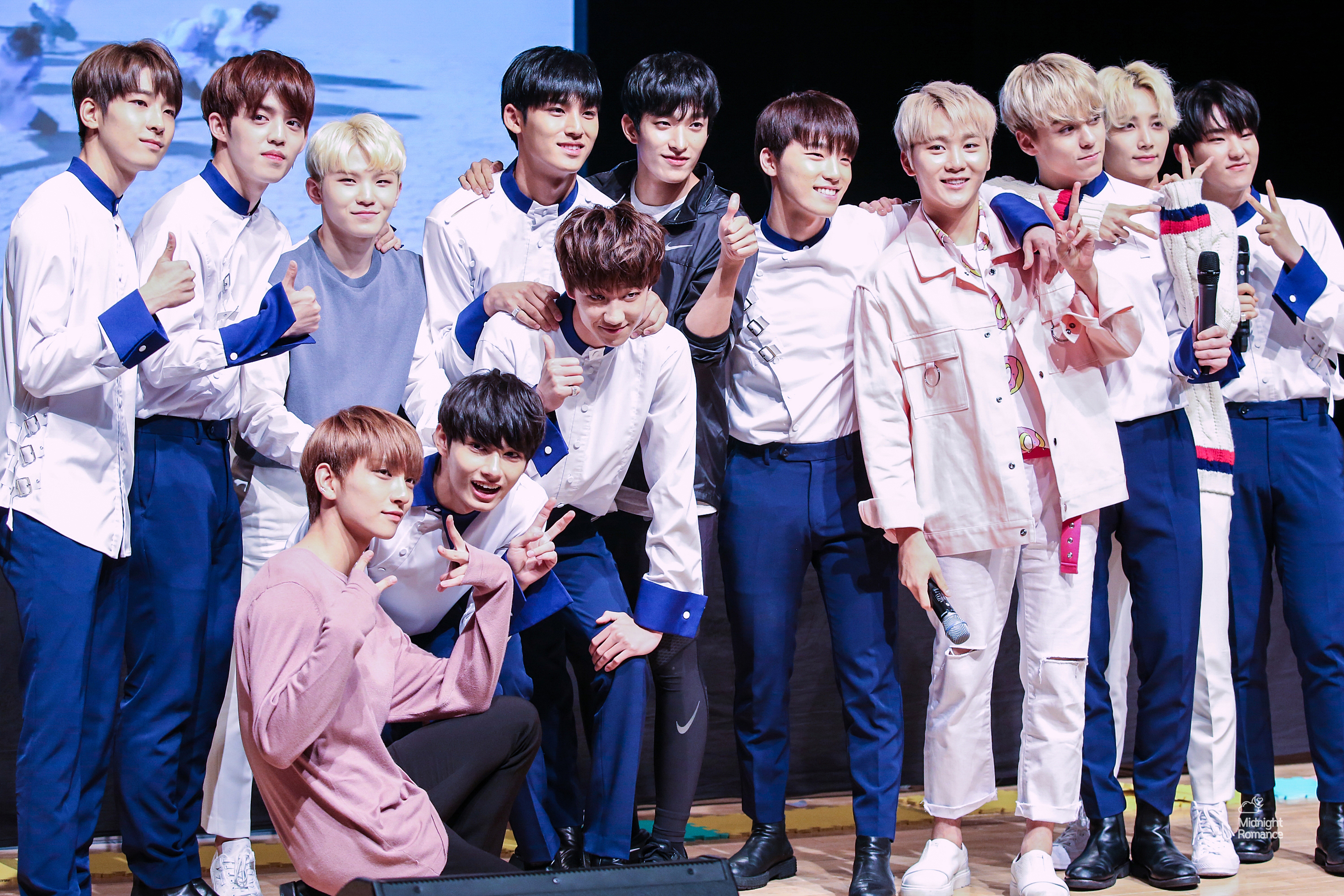 170624 건대 팬사인회